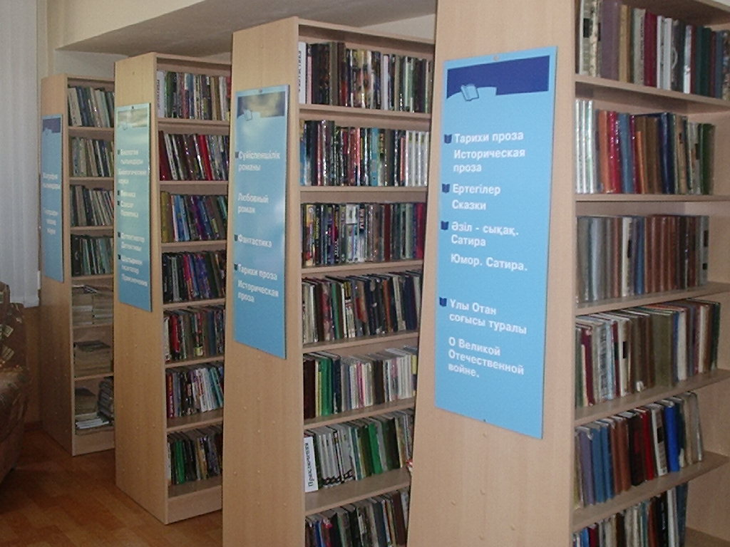 Абонемент